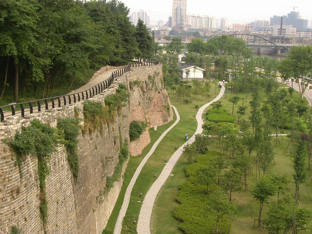 国防園 石頭城城壁 2004年5月22日撮影 撮影者：権作 参照：